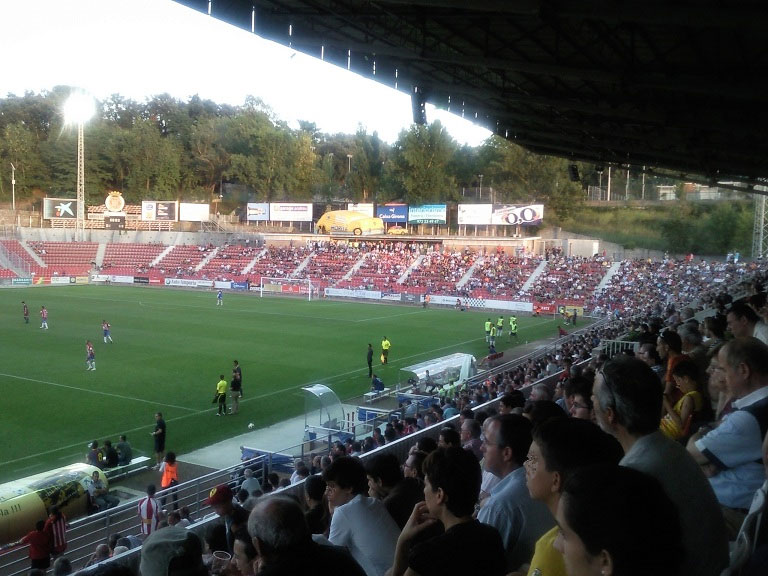 trofeo costa bbrava